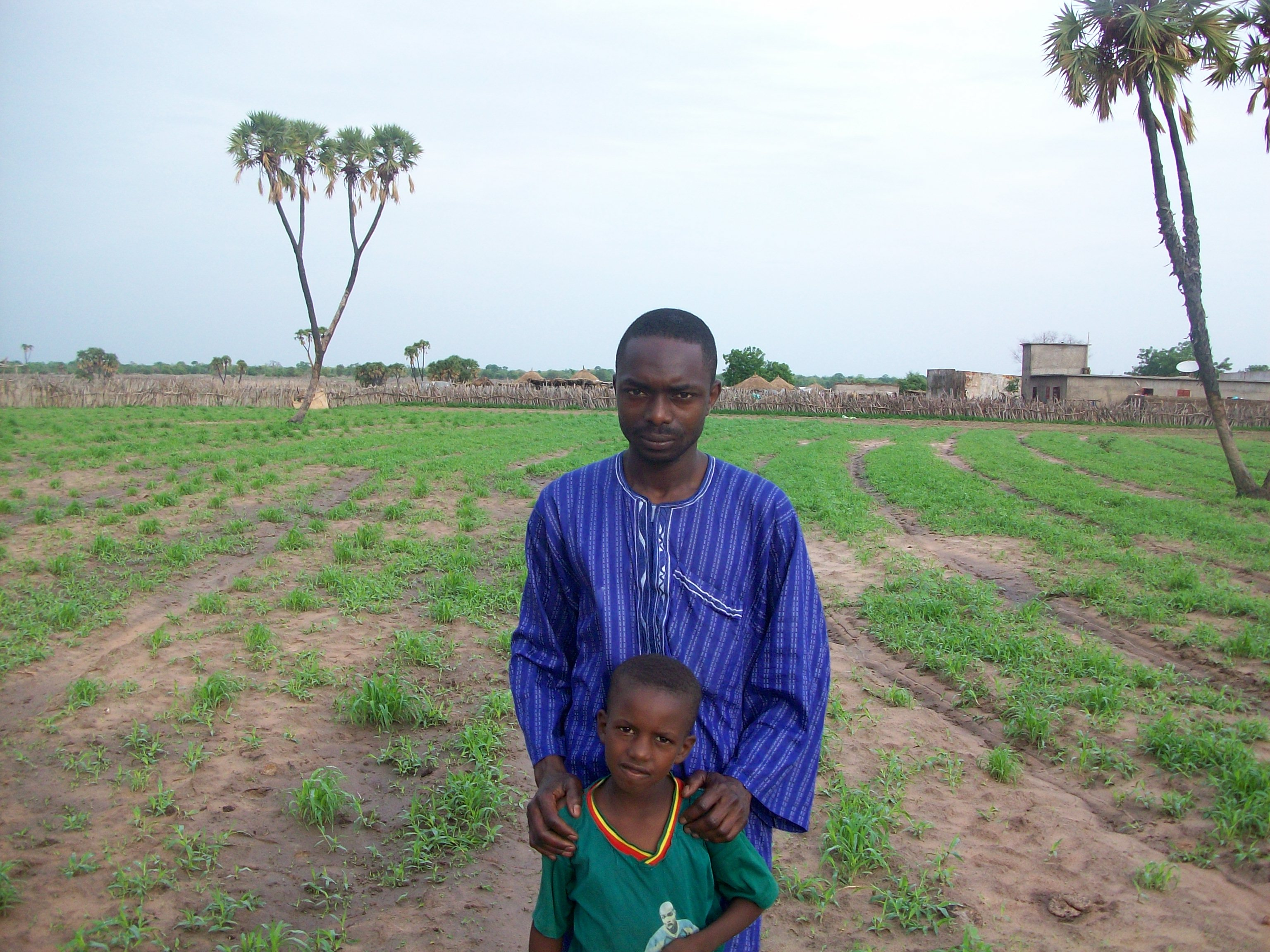 Ousmane Ba, l'actuel Chef du village de Doudé Bagué (Sénégal) et son fils Omar